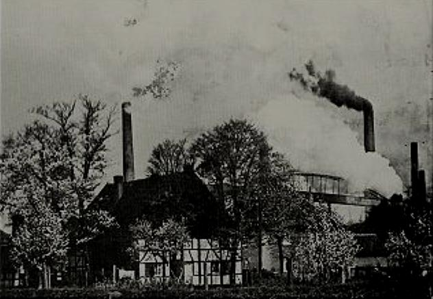 Strangemannshof mit Zechenhintergrund. Den Grund des Verkaufs, kann man dem Foto gut entnehmen.